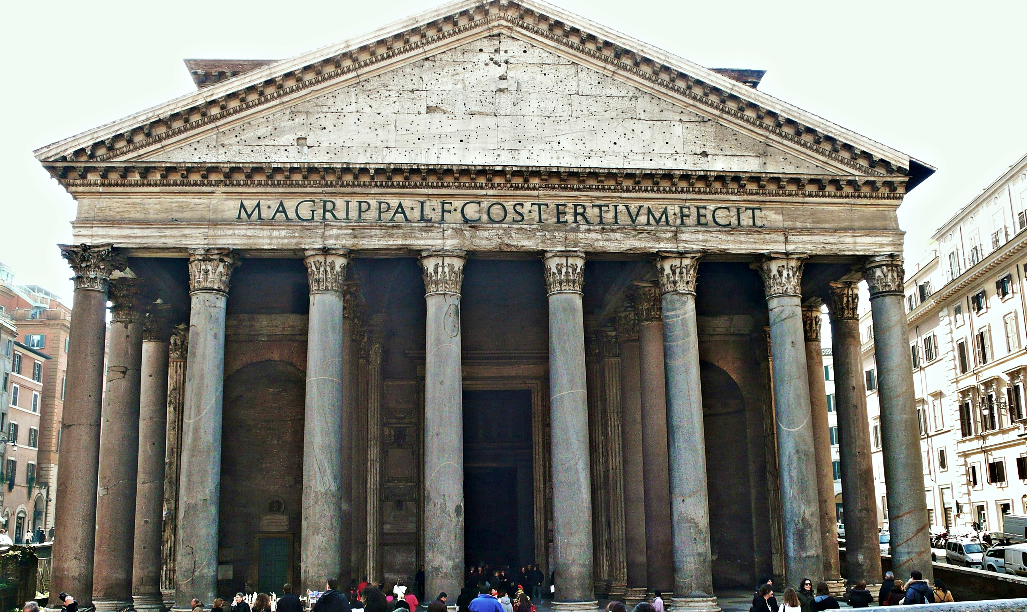 roma